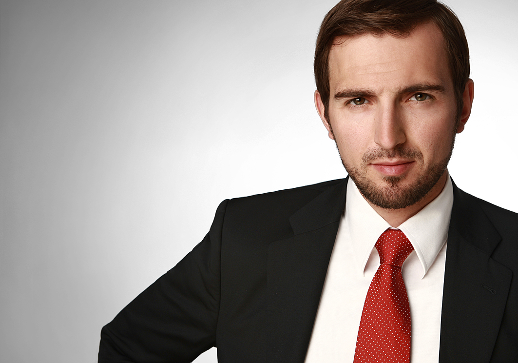 Arne-Patrik Heinze (Pressefoto)